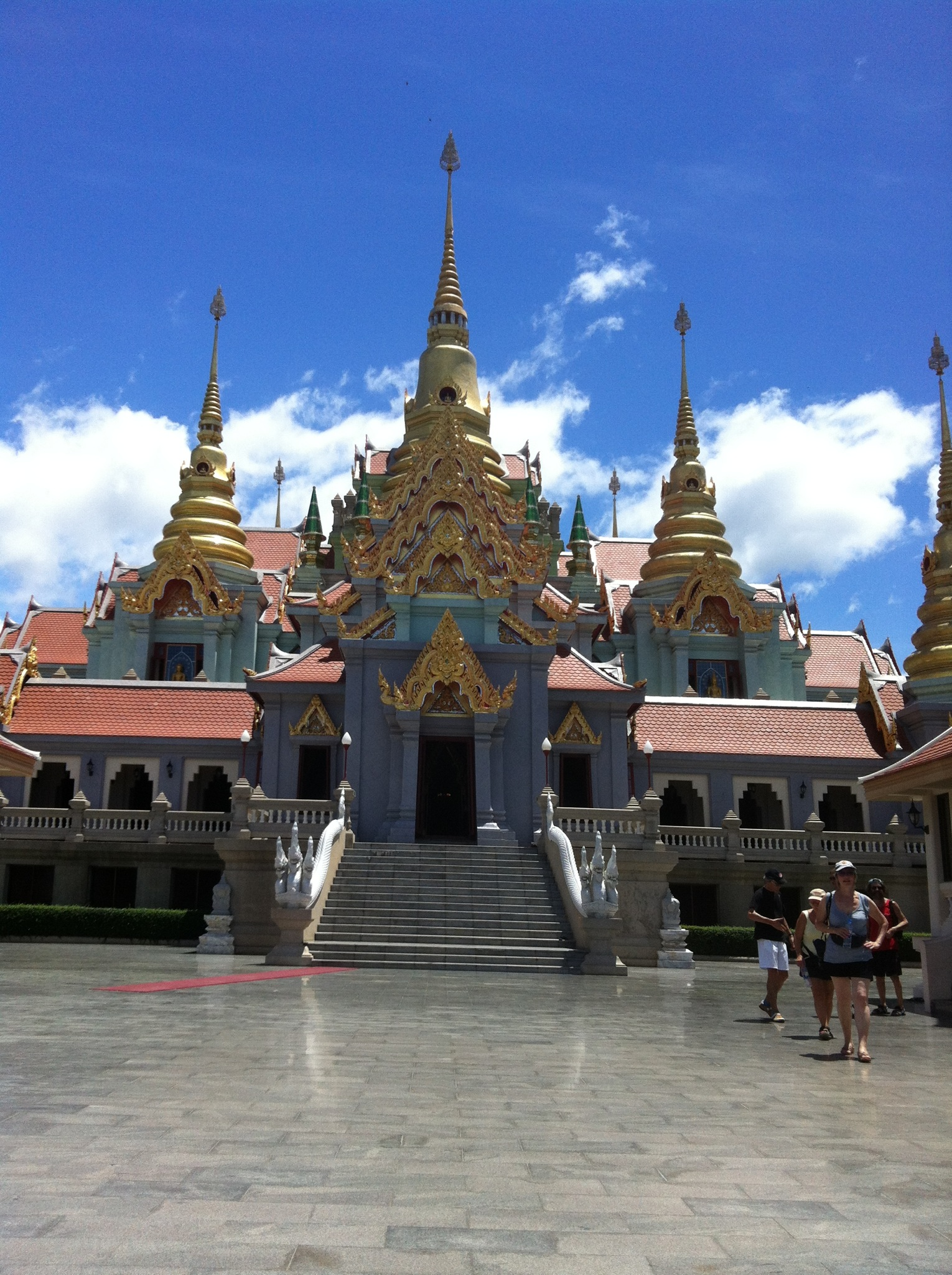 Thong Chai, Bang Saphan District, Prachuap Khiri Khan, Thailand